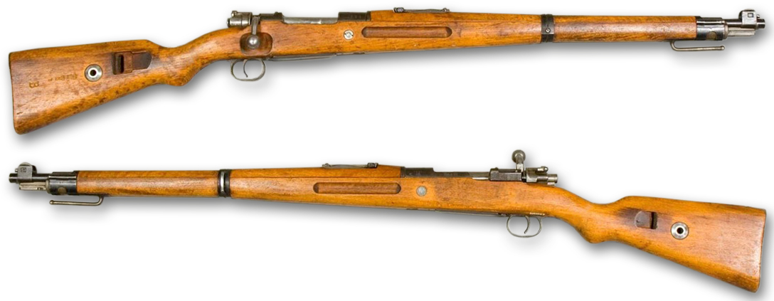 Neue Version des Photos " mit entferntem Hintergrund, entferntem Archivetikett und hinzugefügten technischen Schatten.